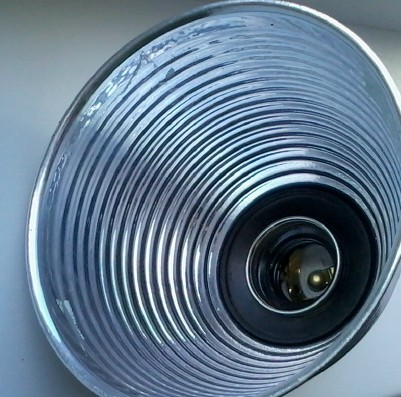 Знято мобілкою Самсунг